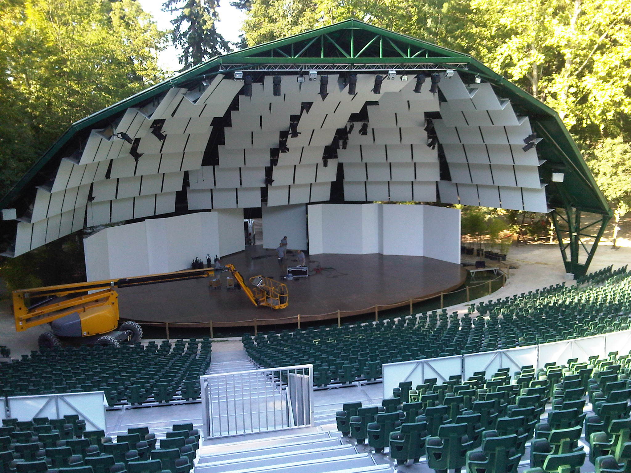 Scène du festival de piano de la Roque d'Anthéron